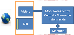 Sima